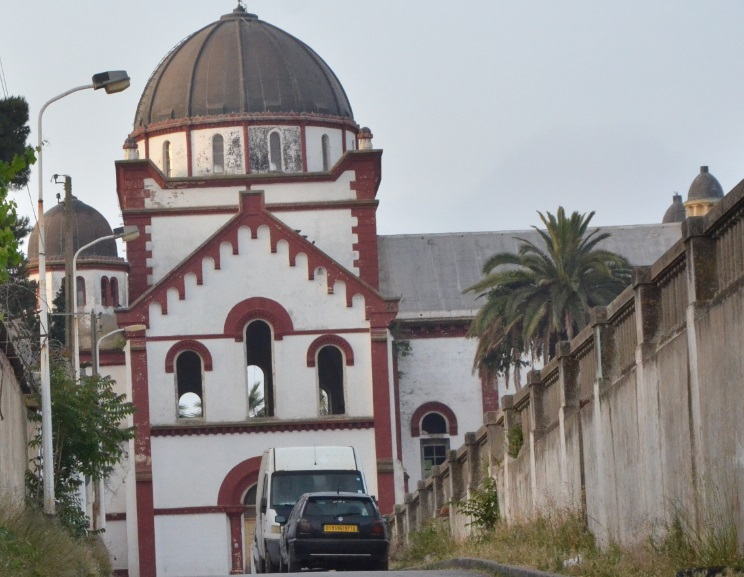 Eglise Saint-Vincent-de-Paul de Kouba